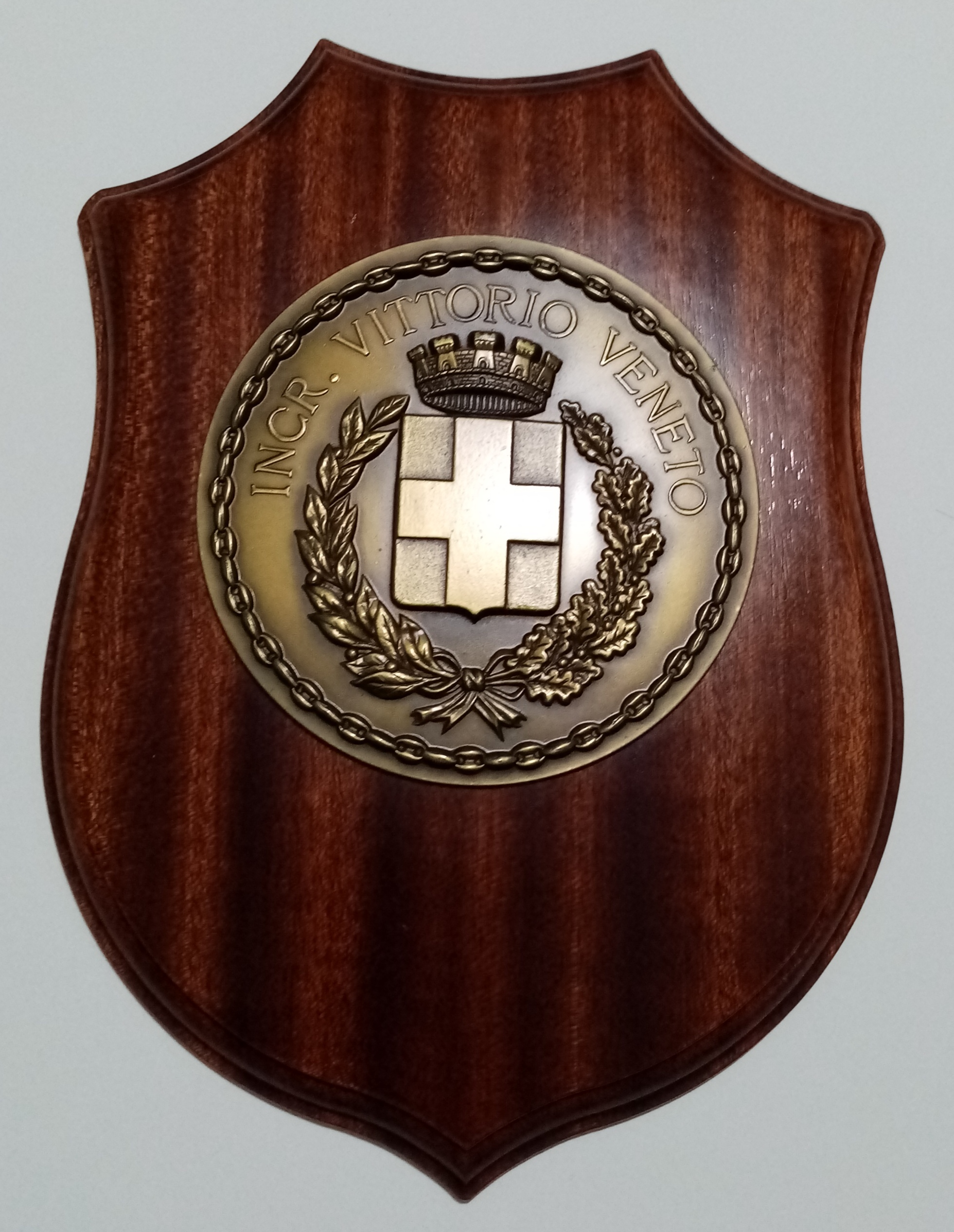 Crest dell'Incrociatore Vittorio Veneto (550)